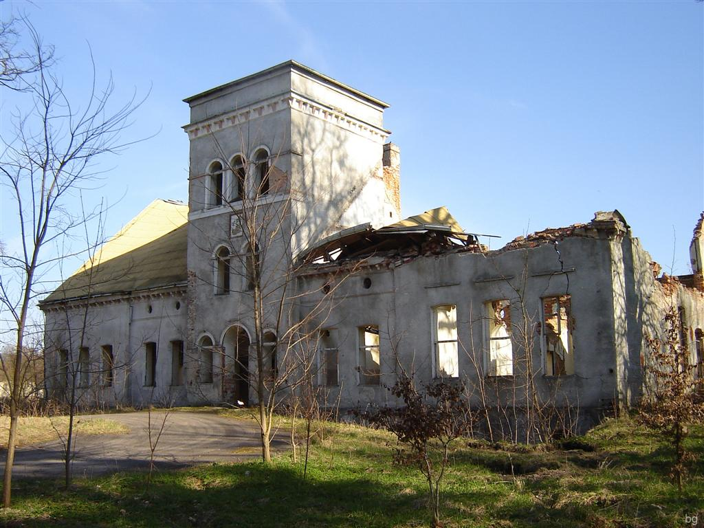 Ruiny pałacu w Smęcinie.